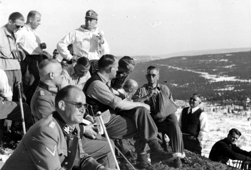 Skeikampen April 1942 General Nöring SS Grf Rediess Daluege Terboven